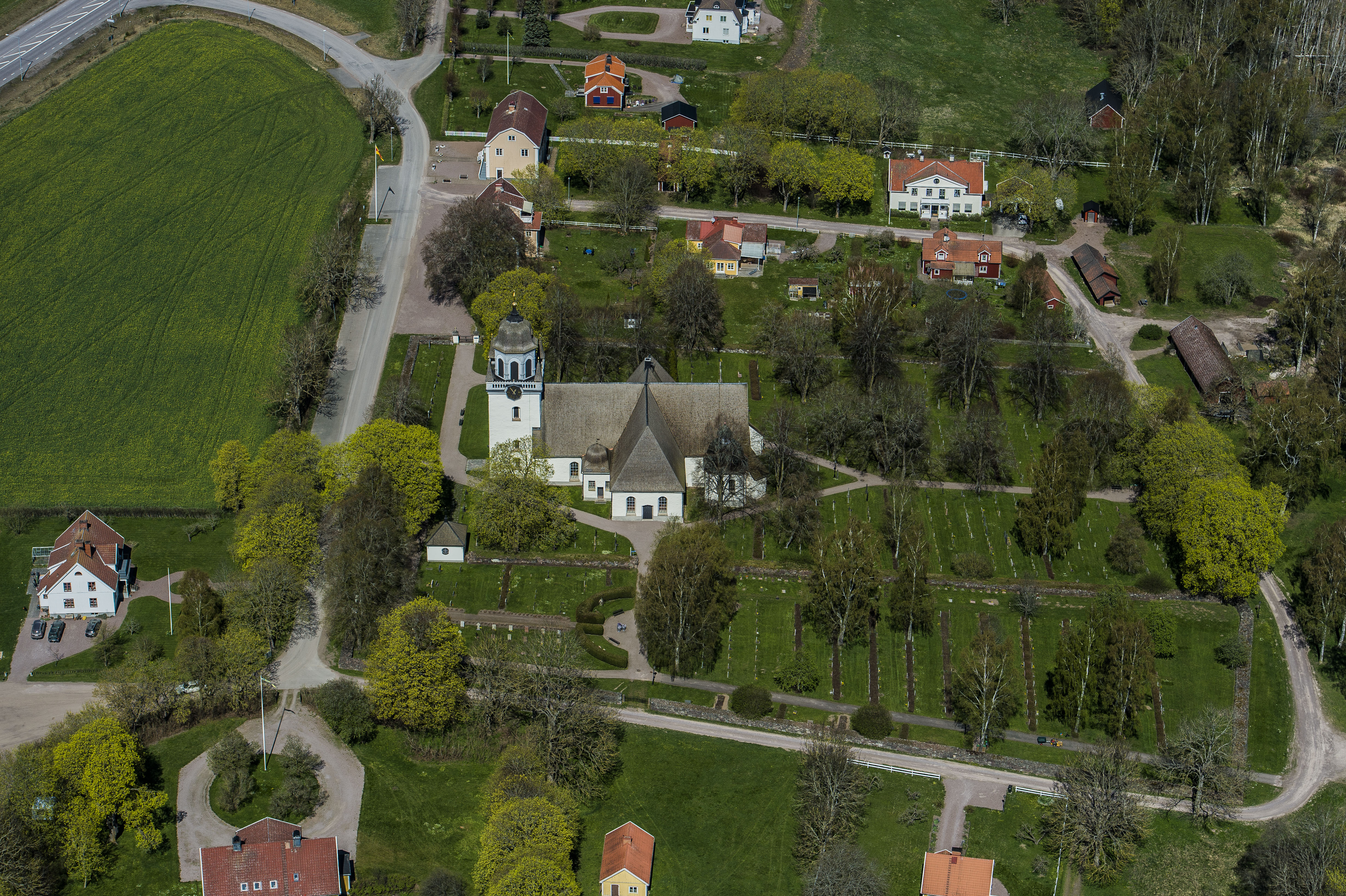 Säby ka